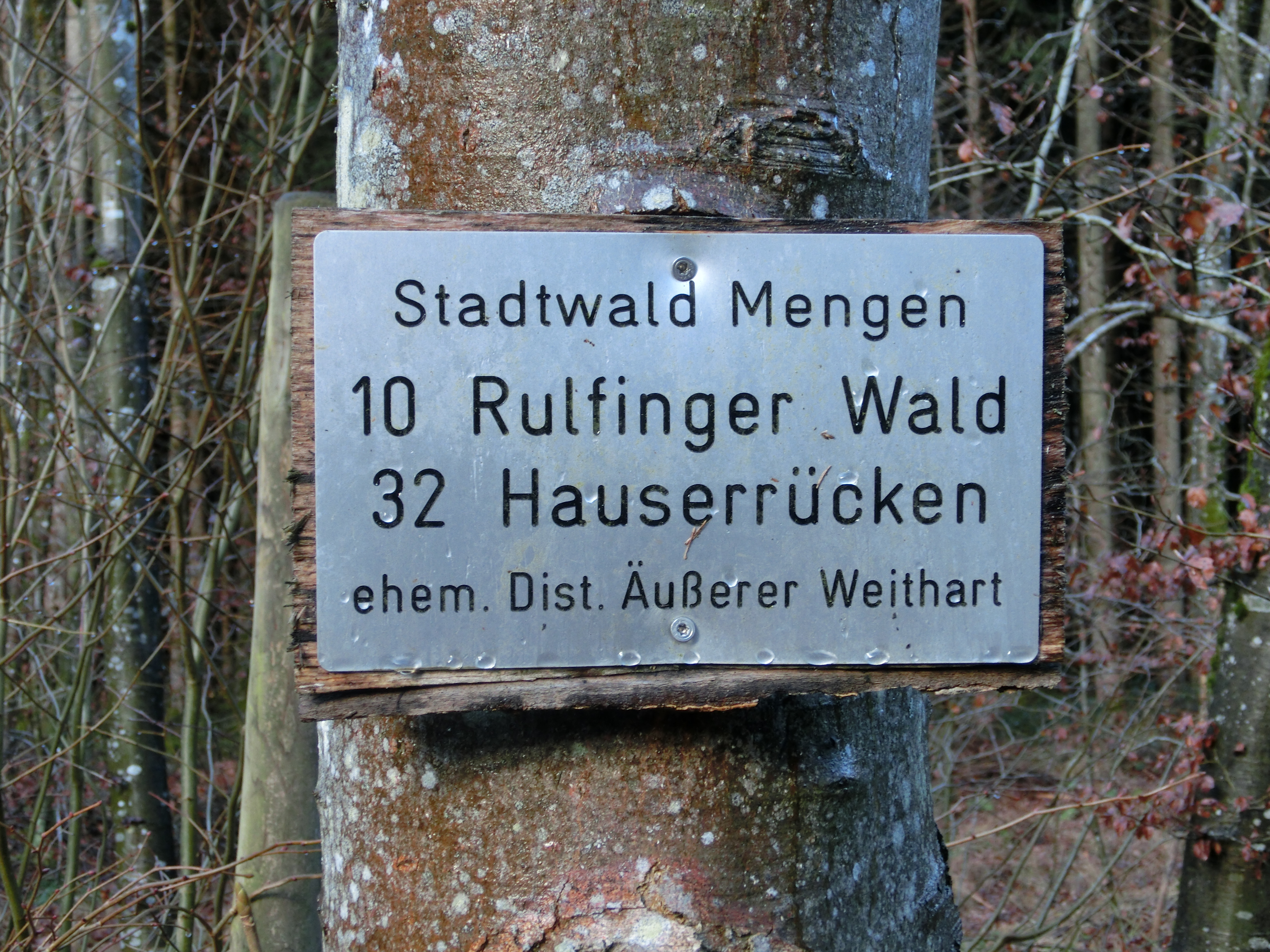 Deutschland (D) - Baden-Württemberg (BW) - Landkreis Sigmaringen (SIG) - Mengen, Weithart: Kennzeichnung der Abteilung "32 Hauserrücken" im Rulfinger Wald, Abschnitt 10 des Stadtwalds